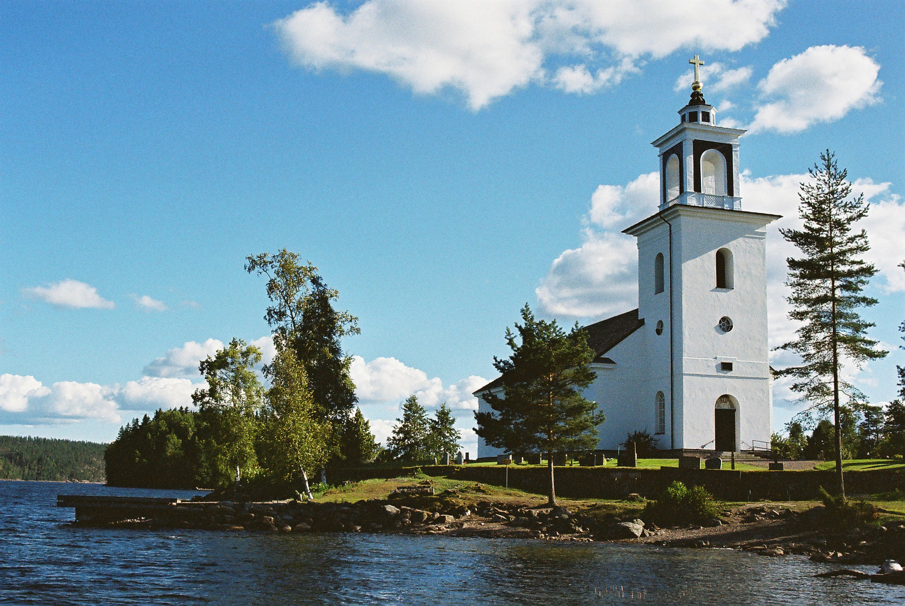 Kyrkan sedd fr...